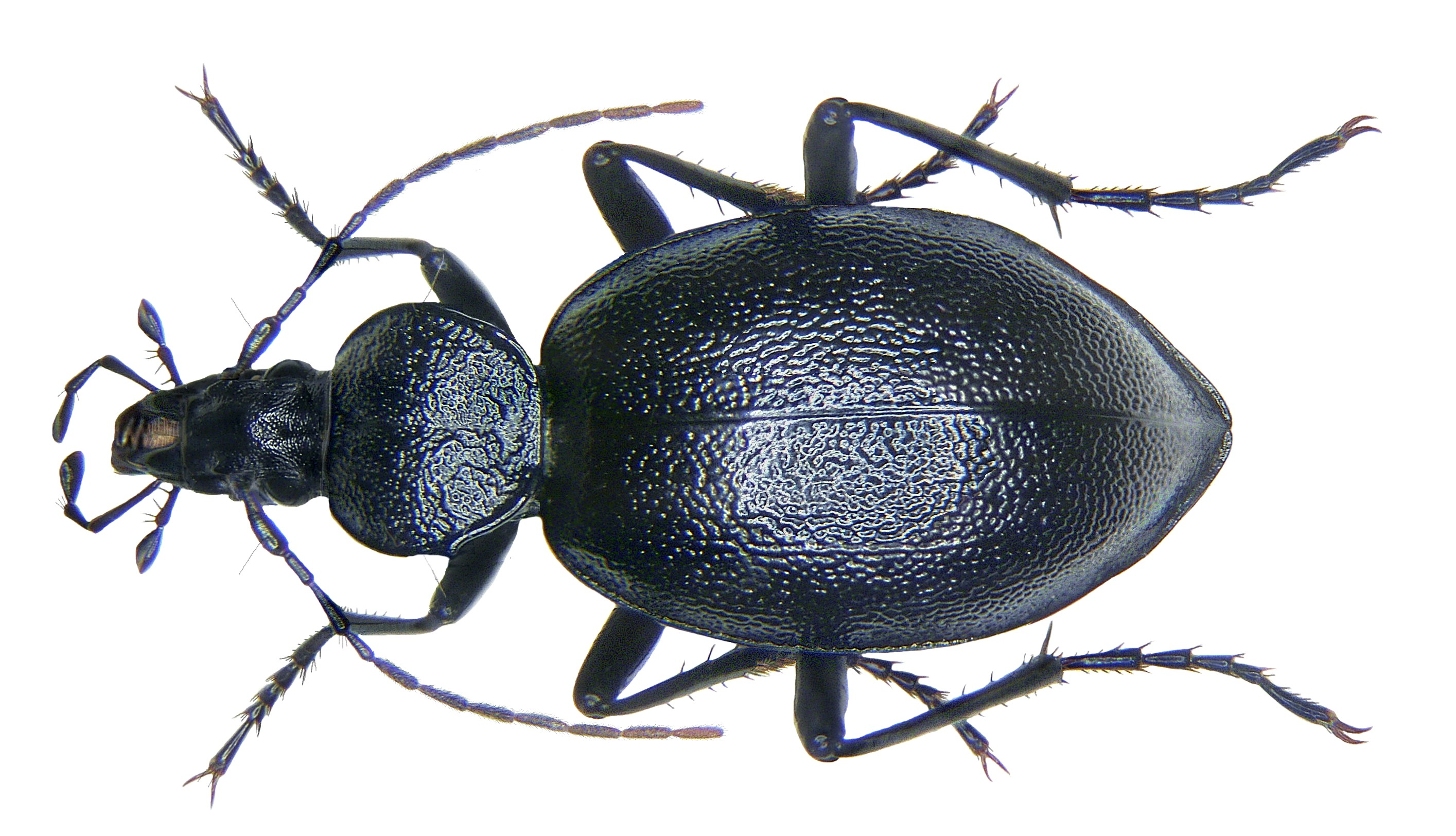 Familie: Carabidae Größe: 16-23 mm Verbreitung: Europa, von den Pyrenäen bis zum Ural Ökologie: in Wäldern Fundort: Italia, Südtirol, Wolkenstein leg.det. U.Schmidt, 1987 Foto: U.Schmidt, 2006